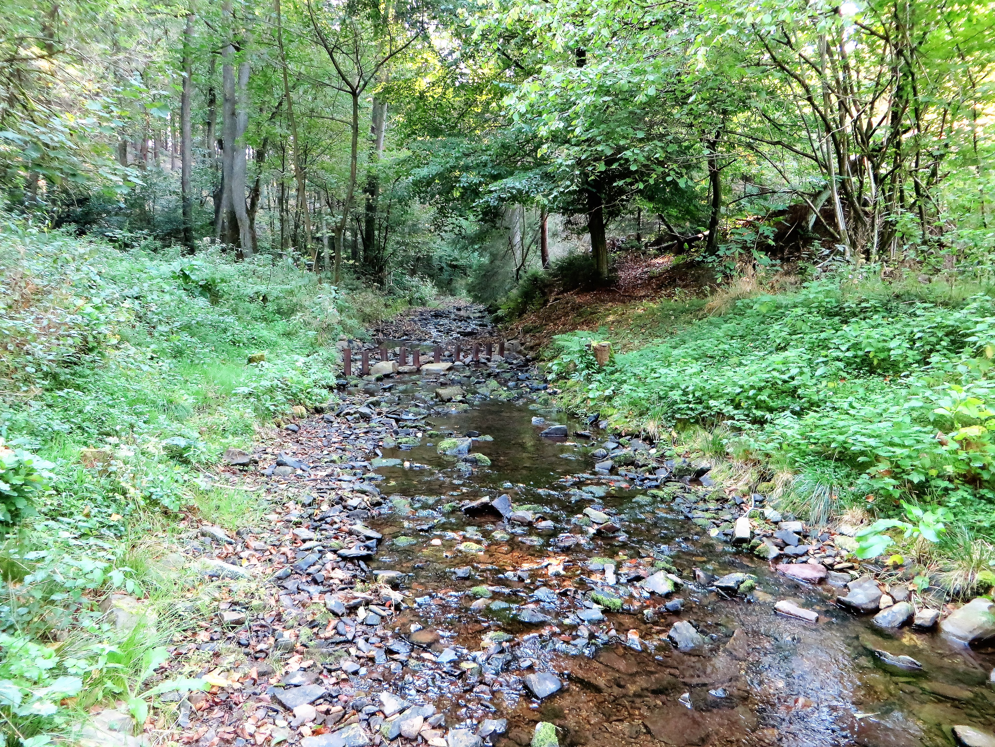 Naturschutzgebiet HA-021 „Hasper Bach“ in Hagen-Haspe. Das Schutzgebiet umfaßt die mäandrierenden Bachläufe des Hasper- und Hemkerbaches und deren Talräume und Quellhorizonte bis zur Stadtgrenze der Stadt Hagen. Im Westen wird das Gebiet durch die Hasper Talsperre begrenzt. Der Hasper Bach und seine Zuflüsse speisen unmittelbar die Talsperre bzw. deren Vorbecken.